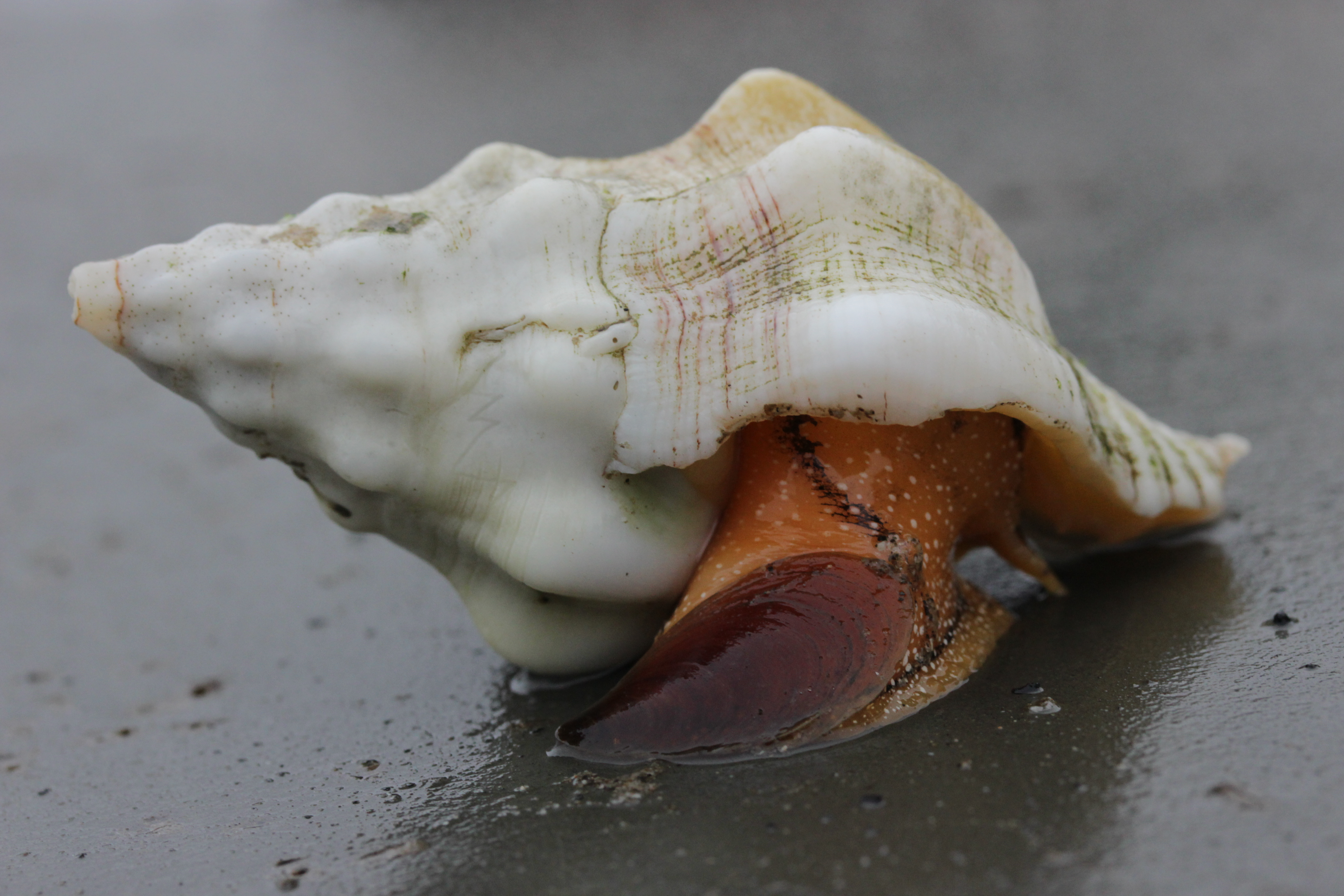 Kellet's Whelk - Kelletia kelletii